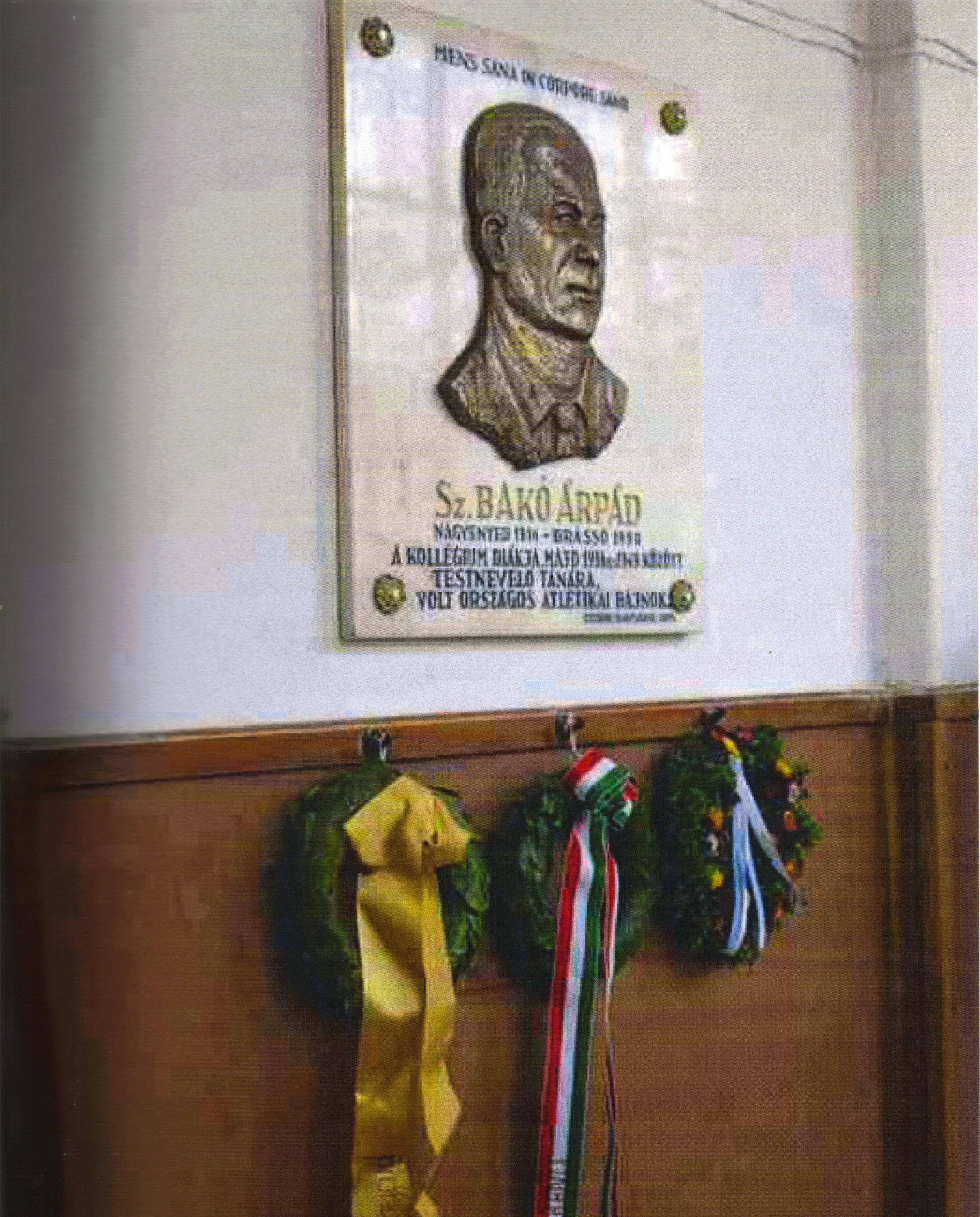 Bakó Árpád emléktáblája a Kolegium folyósóján